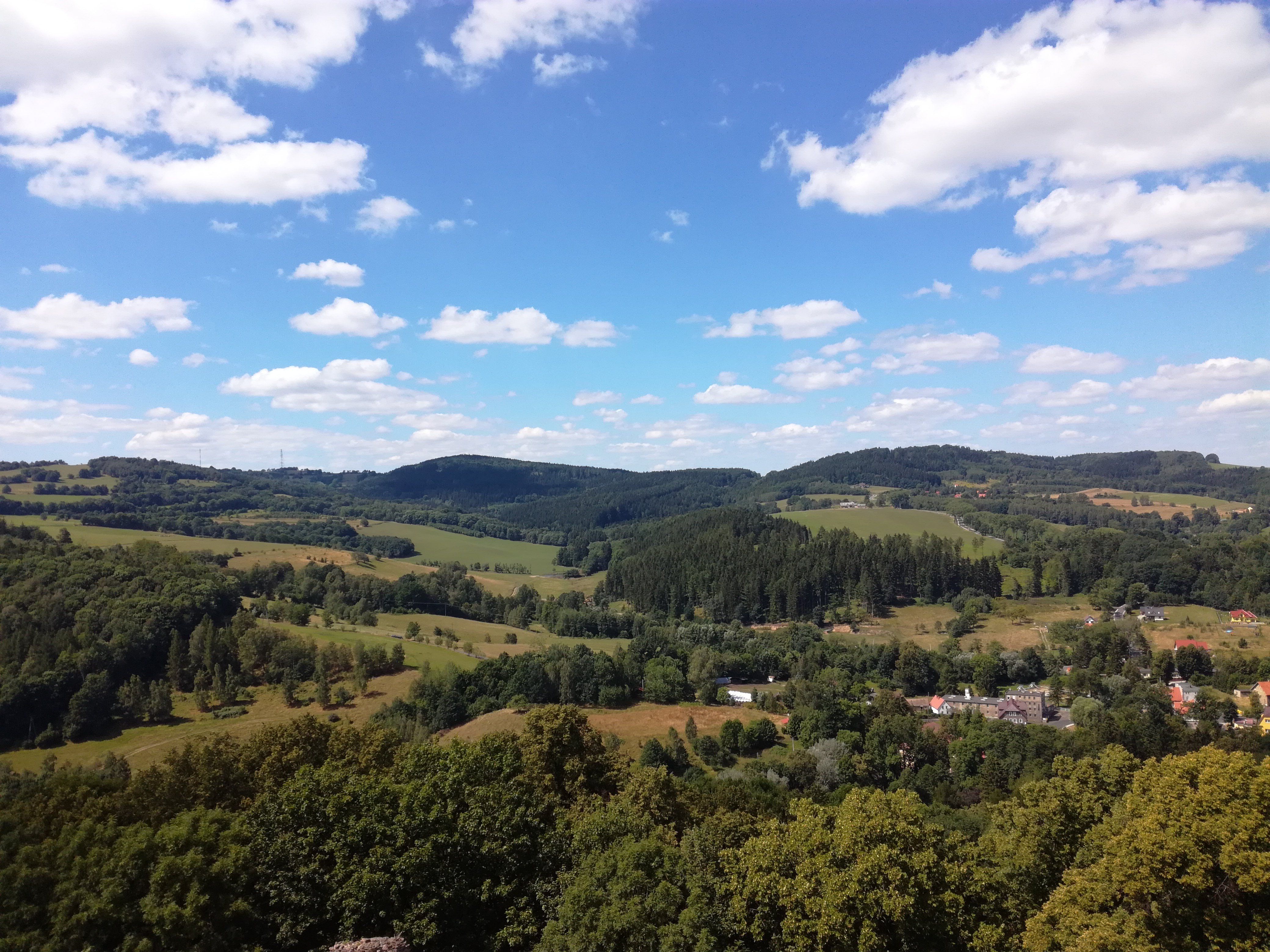 Panorama z Zamku Grodno w kierunku Klasztorzyska.